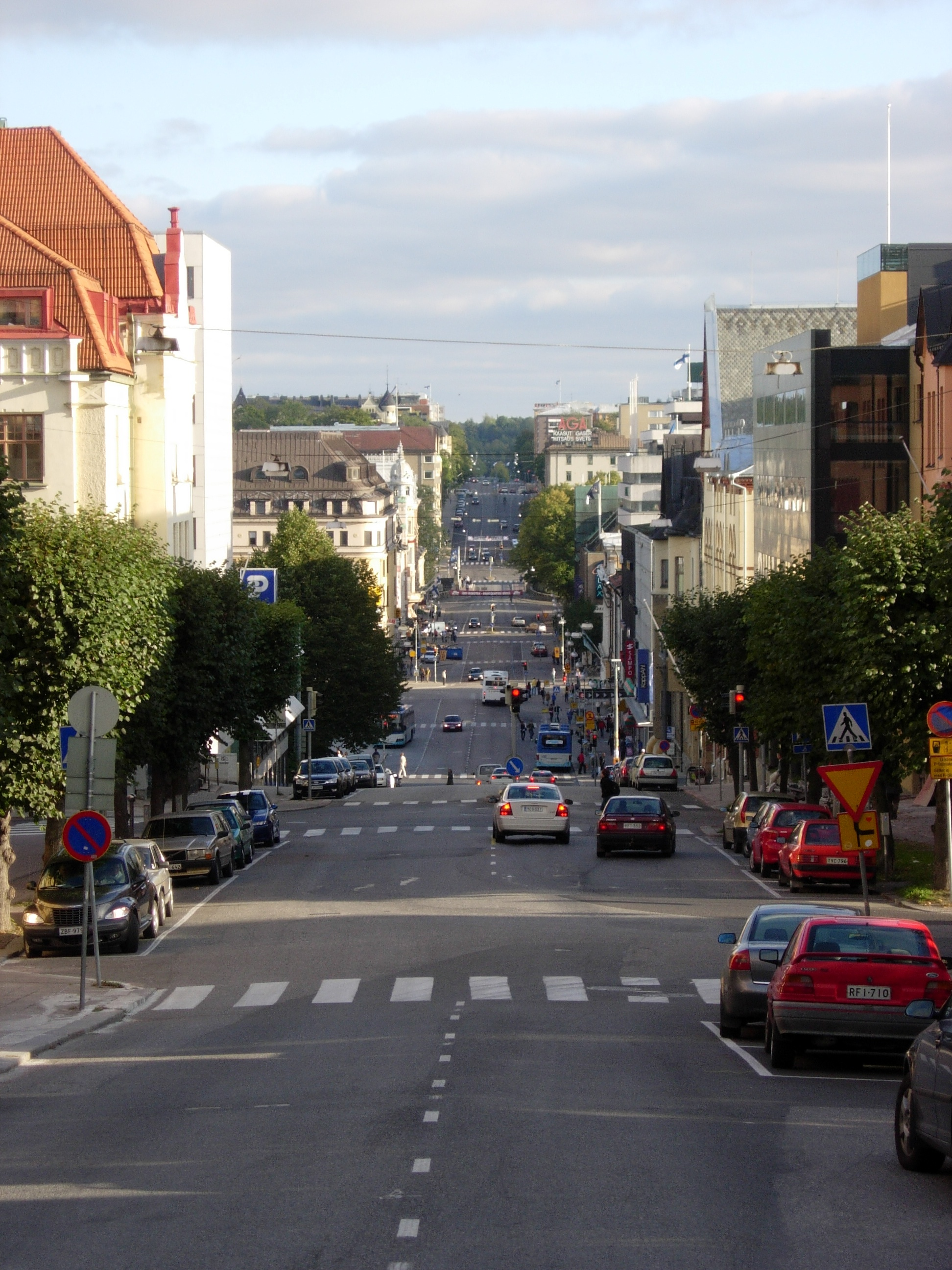 Aurakatu Puolalanmäeltä nähtynä, Turku.